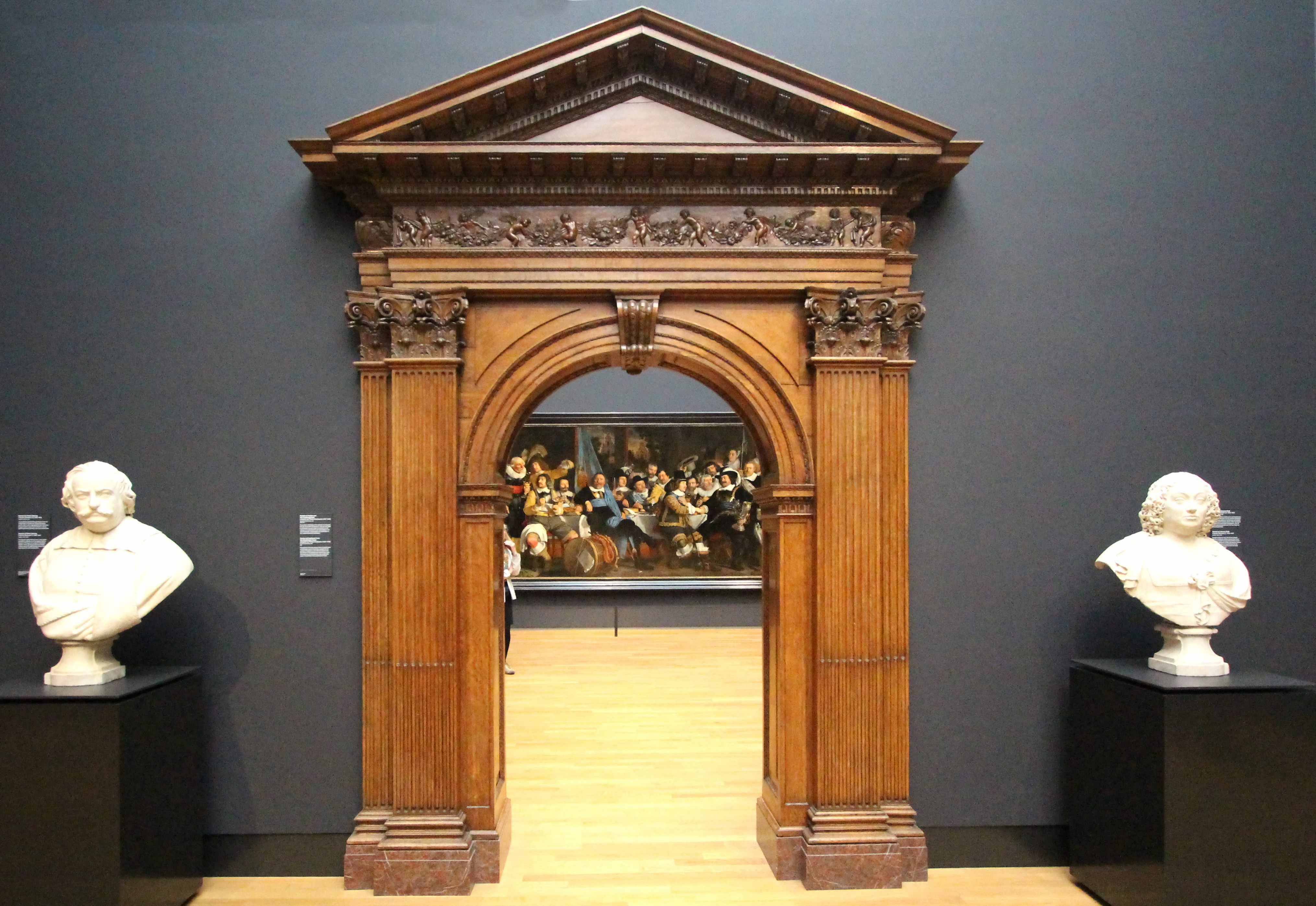 rijksmuseum.amsterdam (118)